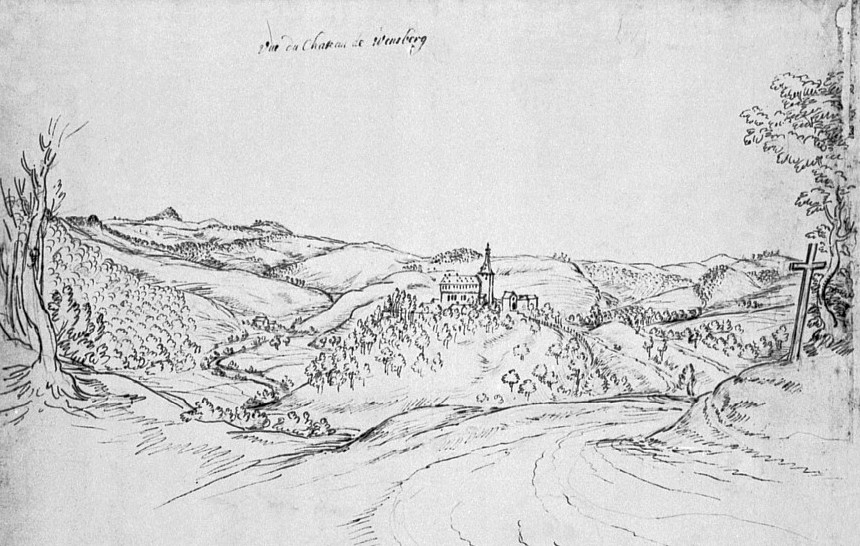 Ansicht der Wensburg bei Lind, Tuschezeichnung